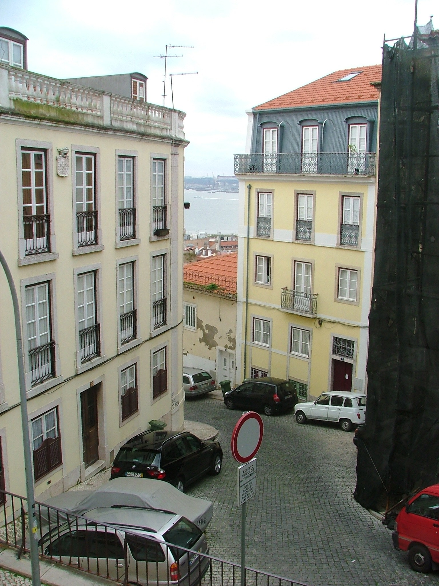 Houses of Calçada do Conde de Panafiel, Lisbon, Portugal